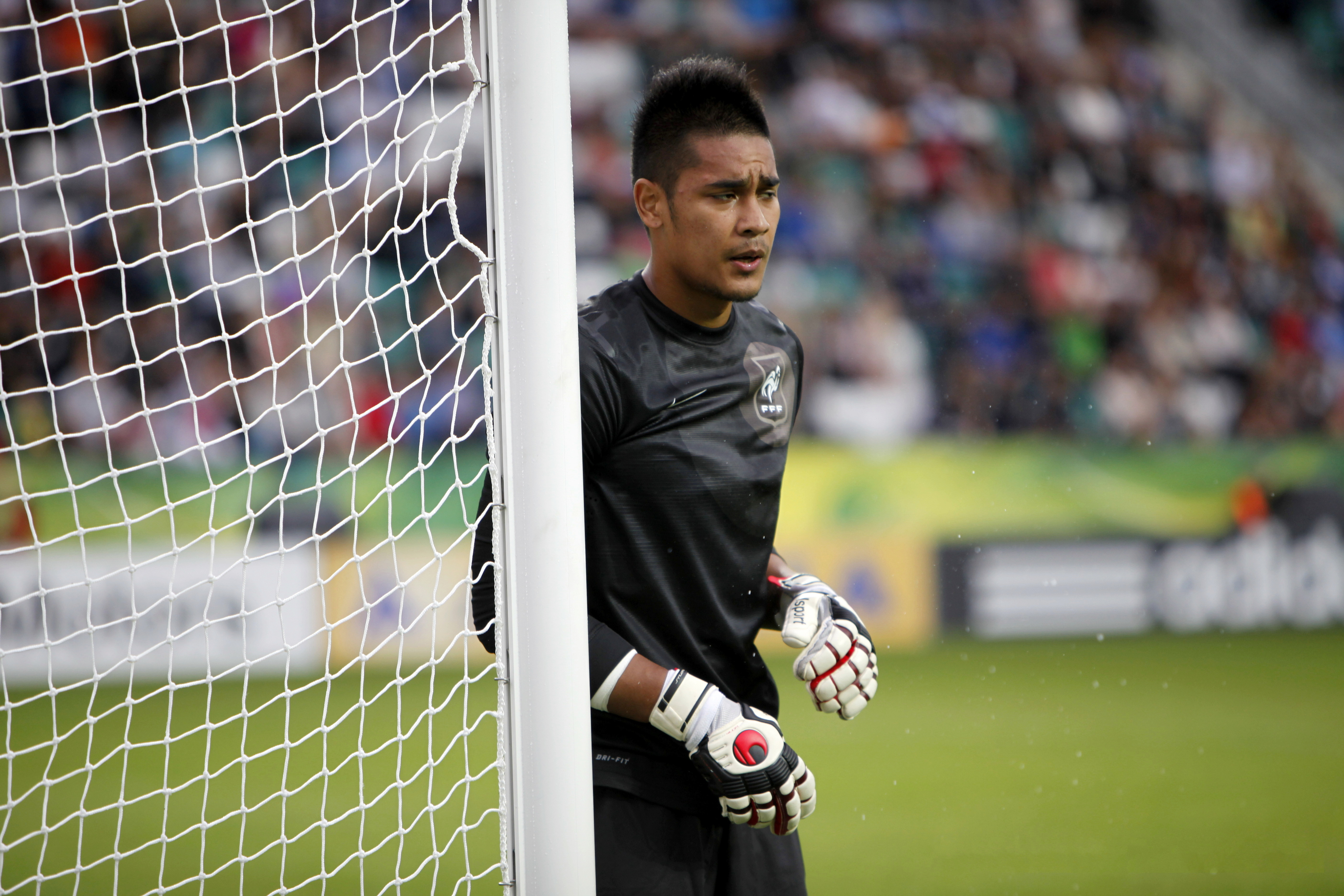 Alphonse Aréola en 2012